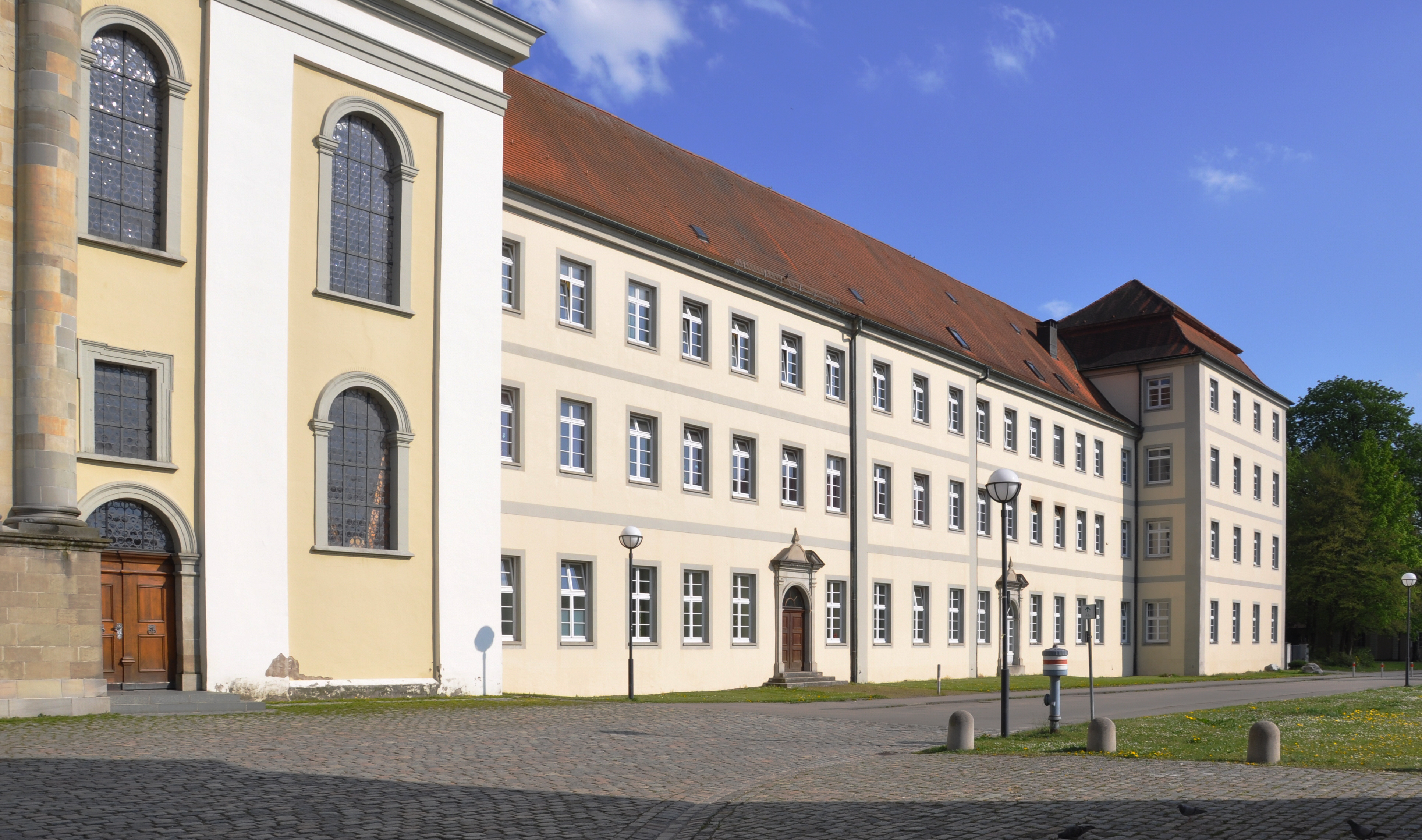 Weißenau, ehem. Kloster, Konventsbau, Westseite (links die Westfassade der Klosterkirche)